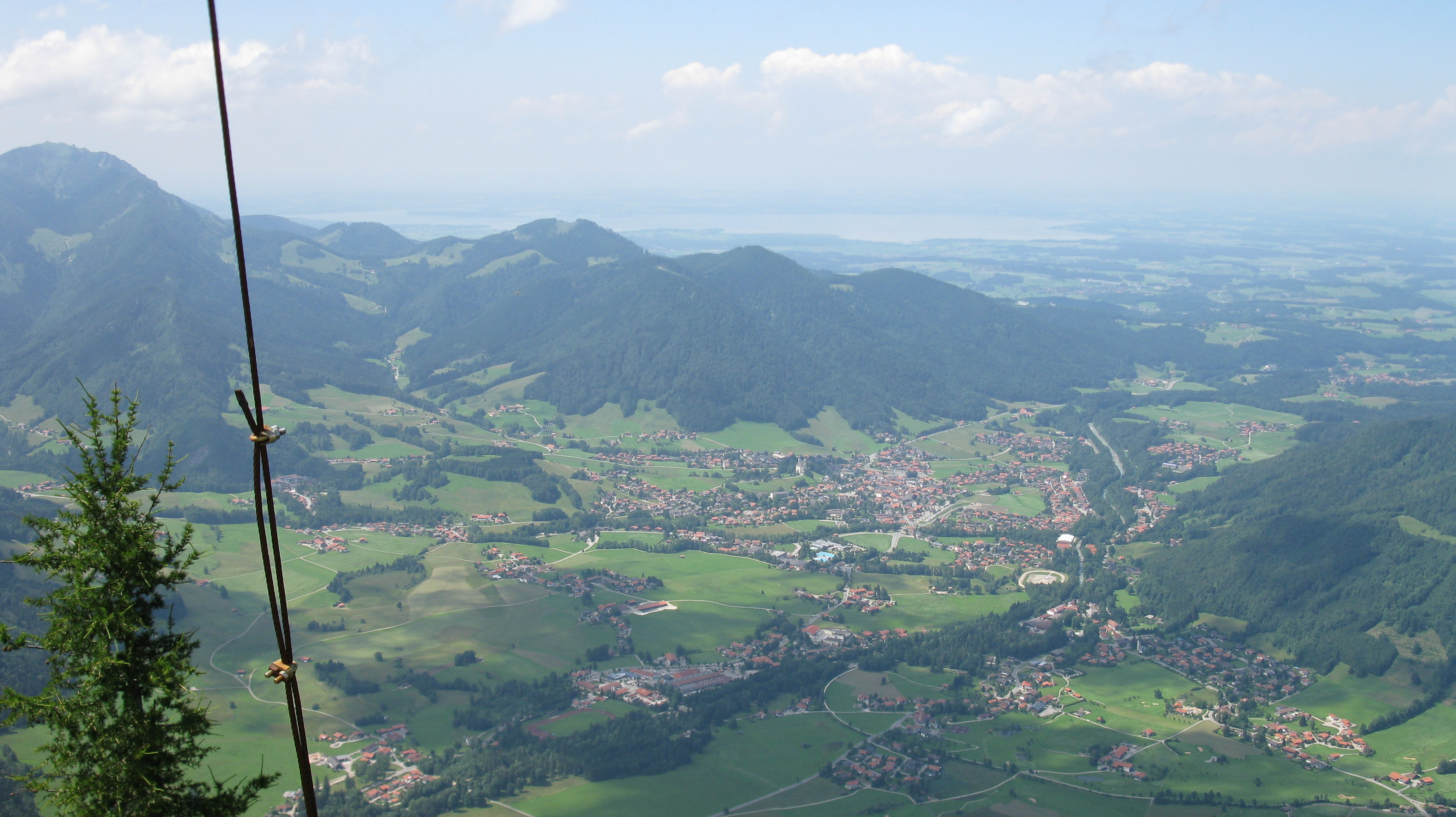 Blick vom Rauschberg auf Ruhpolding; dahinter u.a. Haargaßberg (1210 m) und Scheichenberg (1243 m); links am Bildrand der Hochfelln.